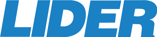 Logotipo de lider en PNG, con transparencias.